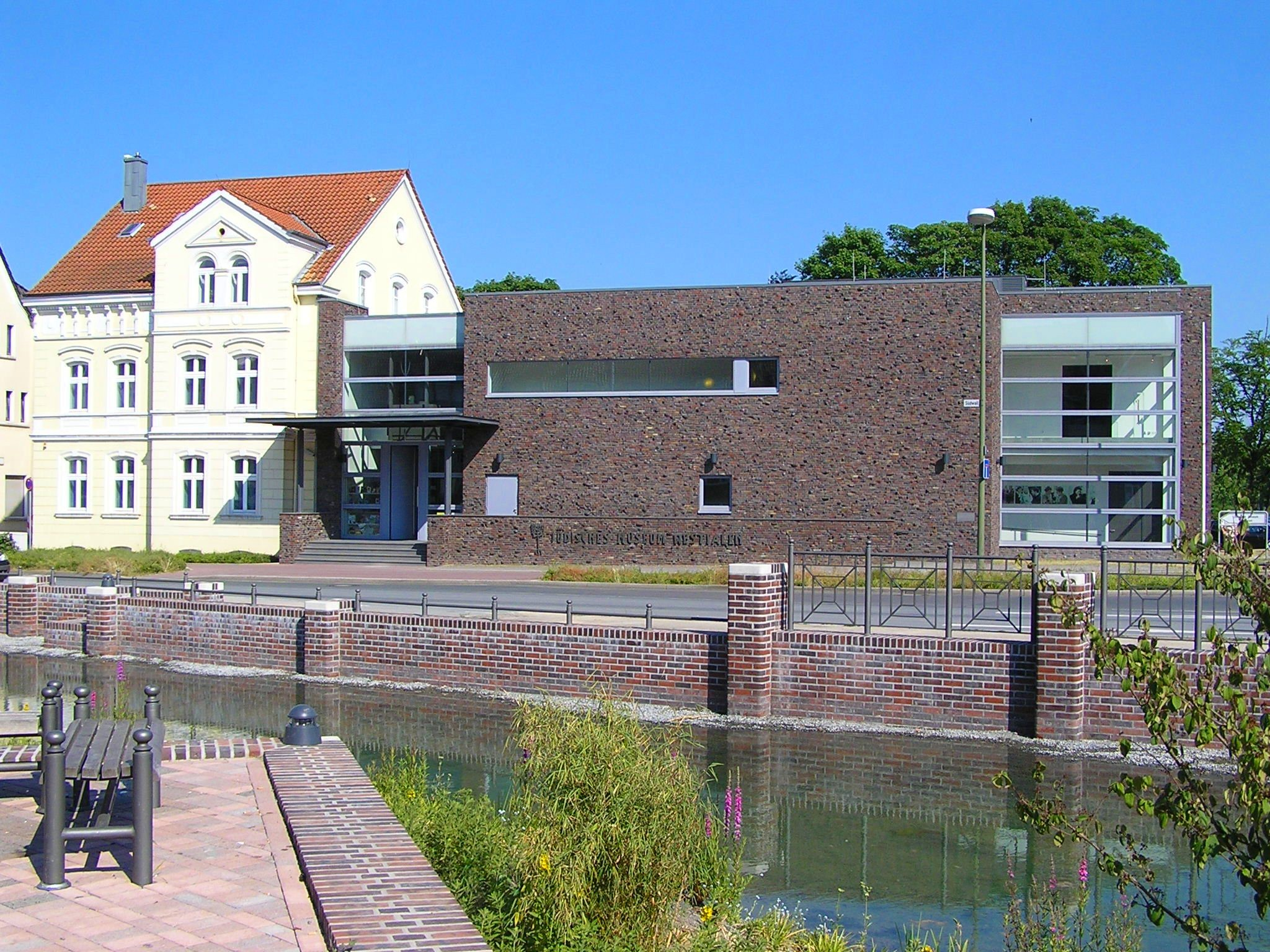 Jüdisches Museum Westfalen (Jewish Museum Westphalia), Dorsten